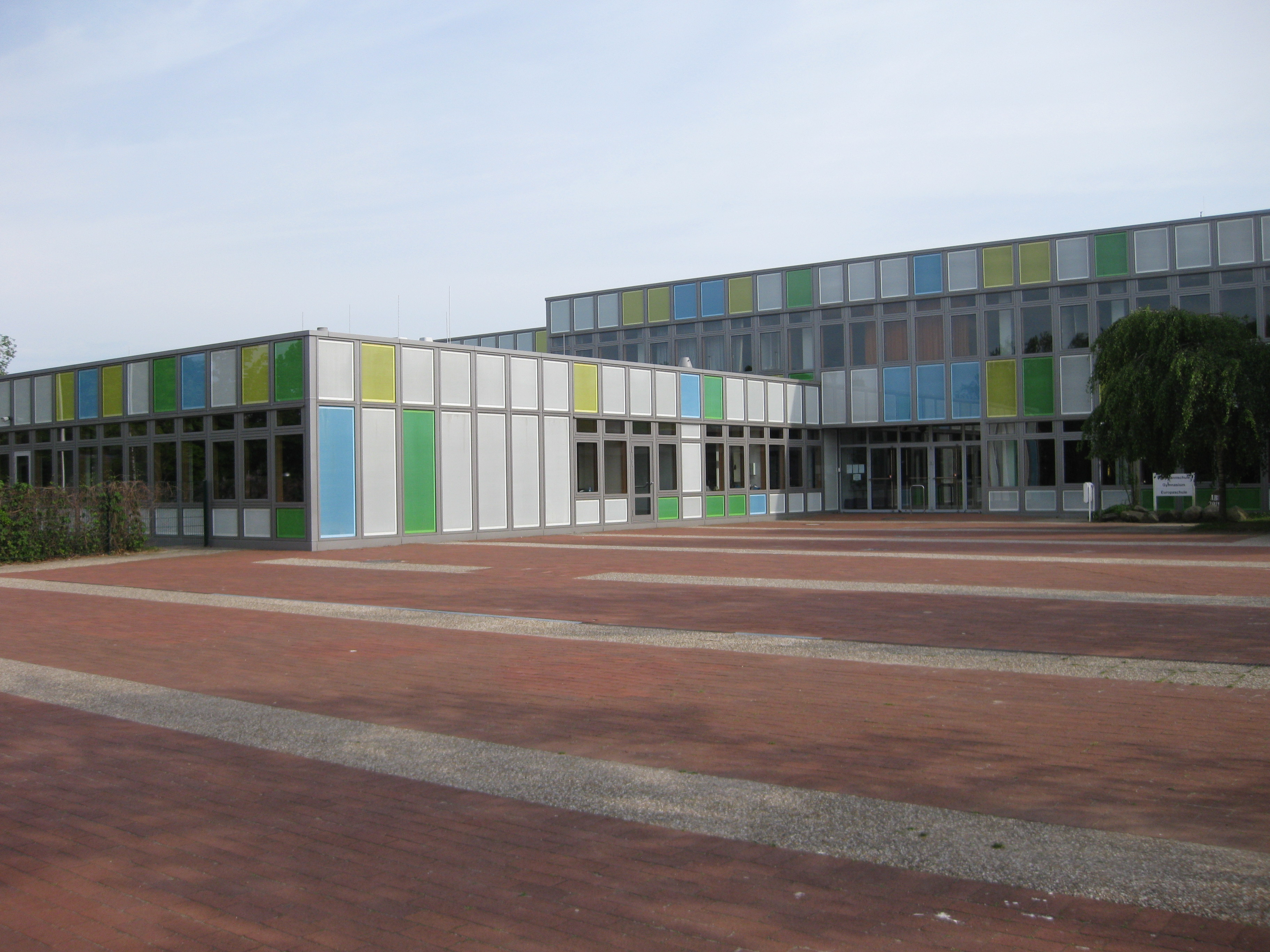 Jungmannschule Eckernförde (2012)